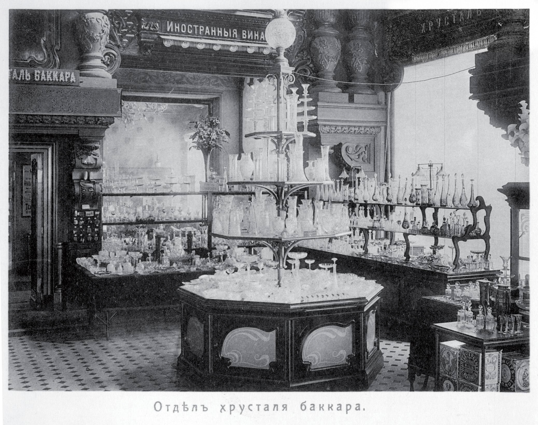 Магазин Елисеева и погреба русских и иностранных вин. Отдел хрусталя Баккара